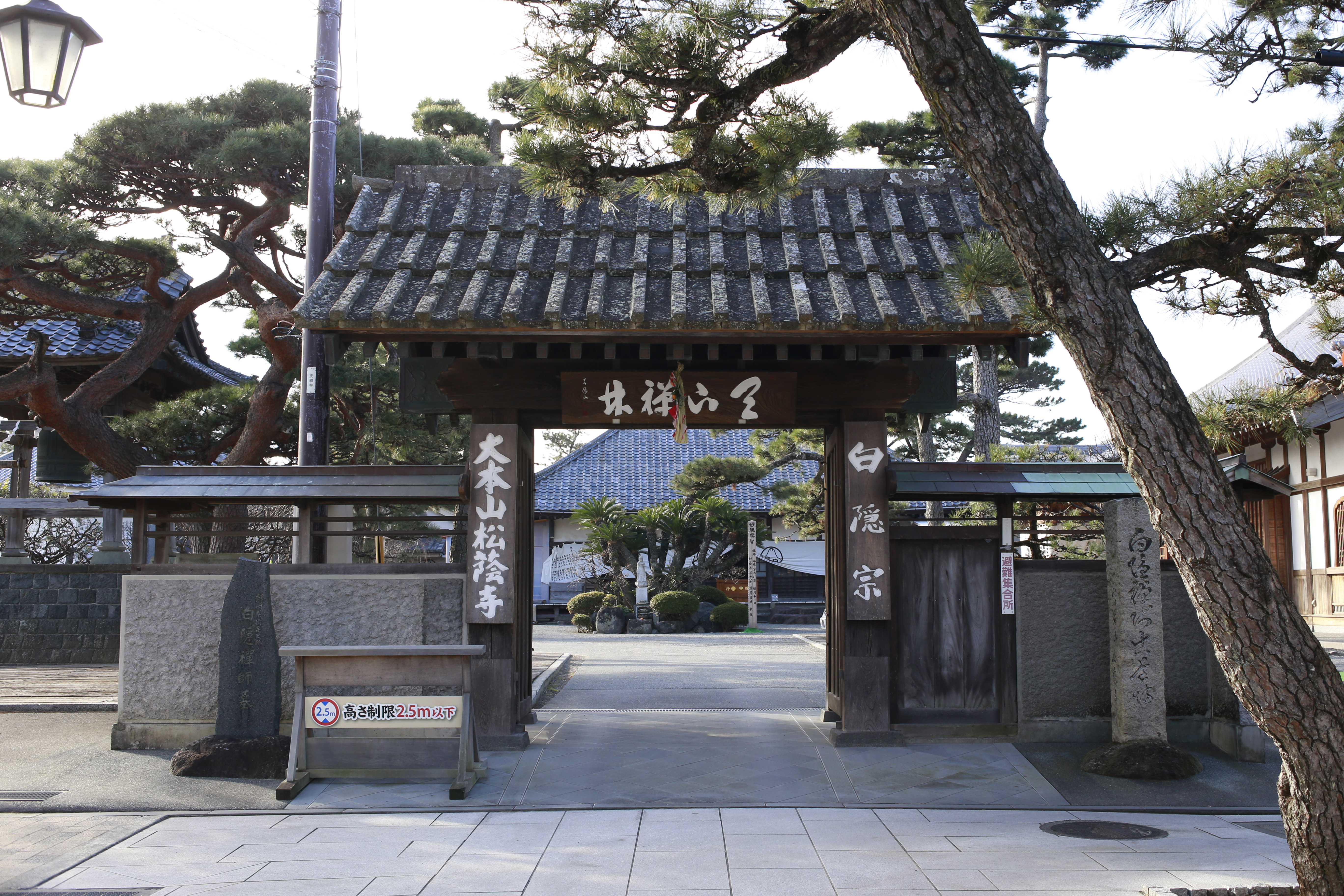 沼津市原の松蔭寺 山門 正面から撮影